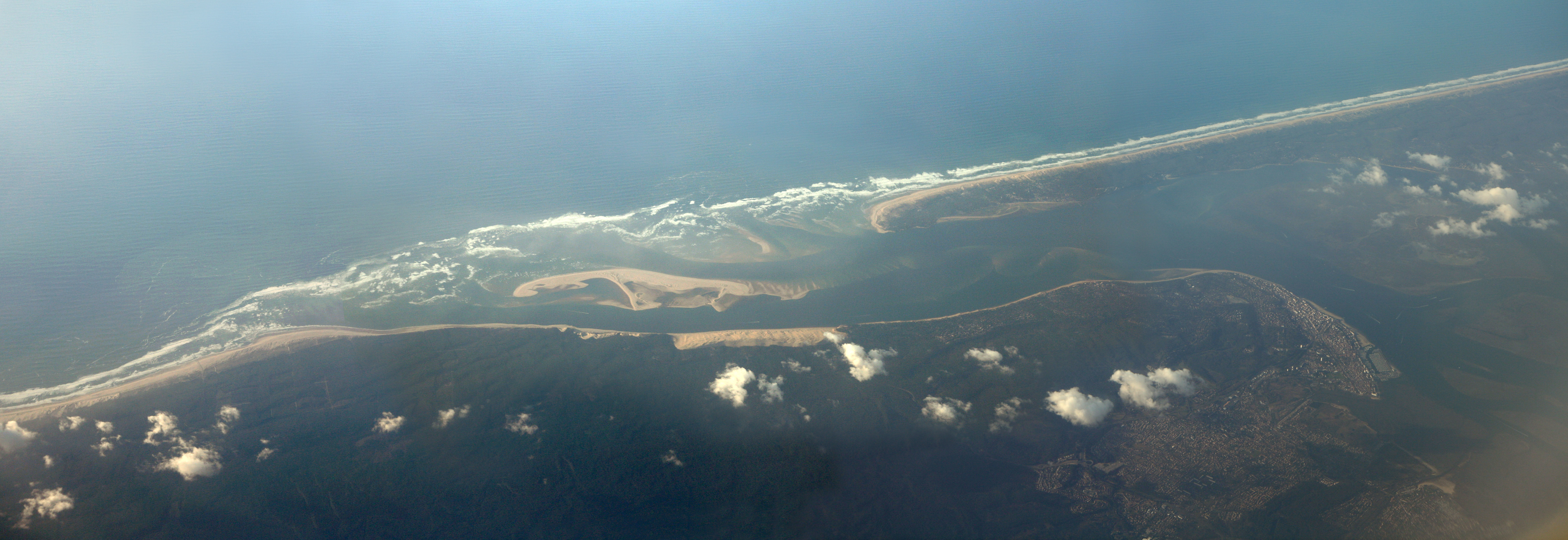 le bassin d'Arcachon vu d'avion